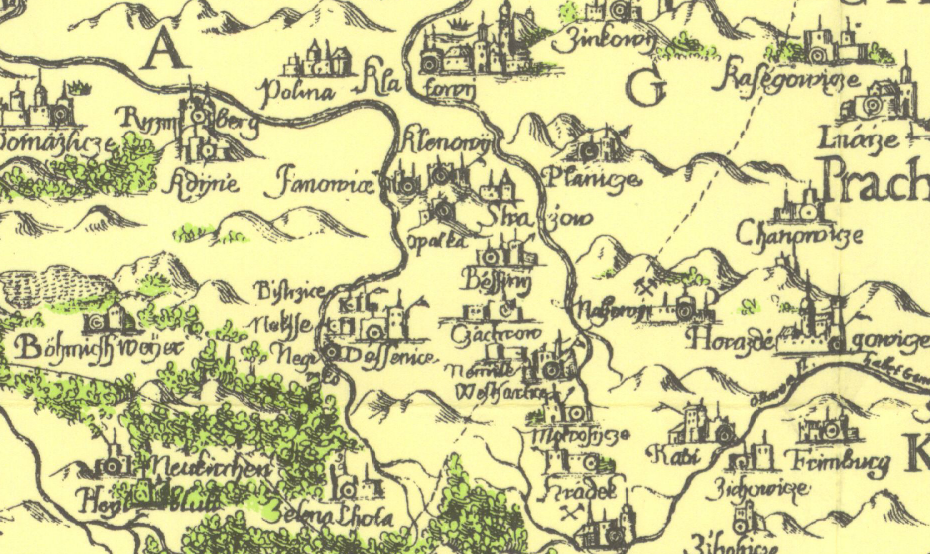 Výřez oblasti Klatovska z Aretinovy mapy Čech z roku 1665 (první vydání 1619).